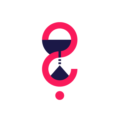 Grafické logo, které vychází z původního loga výzvy Chvilka pro Andreje